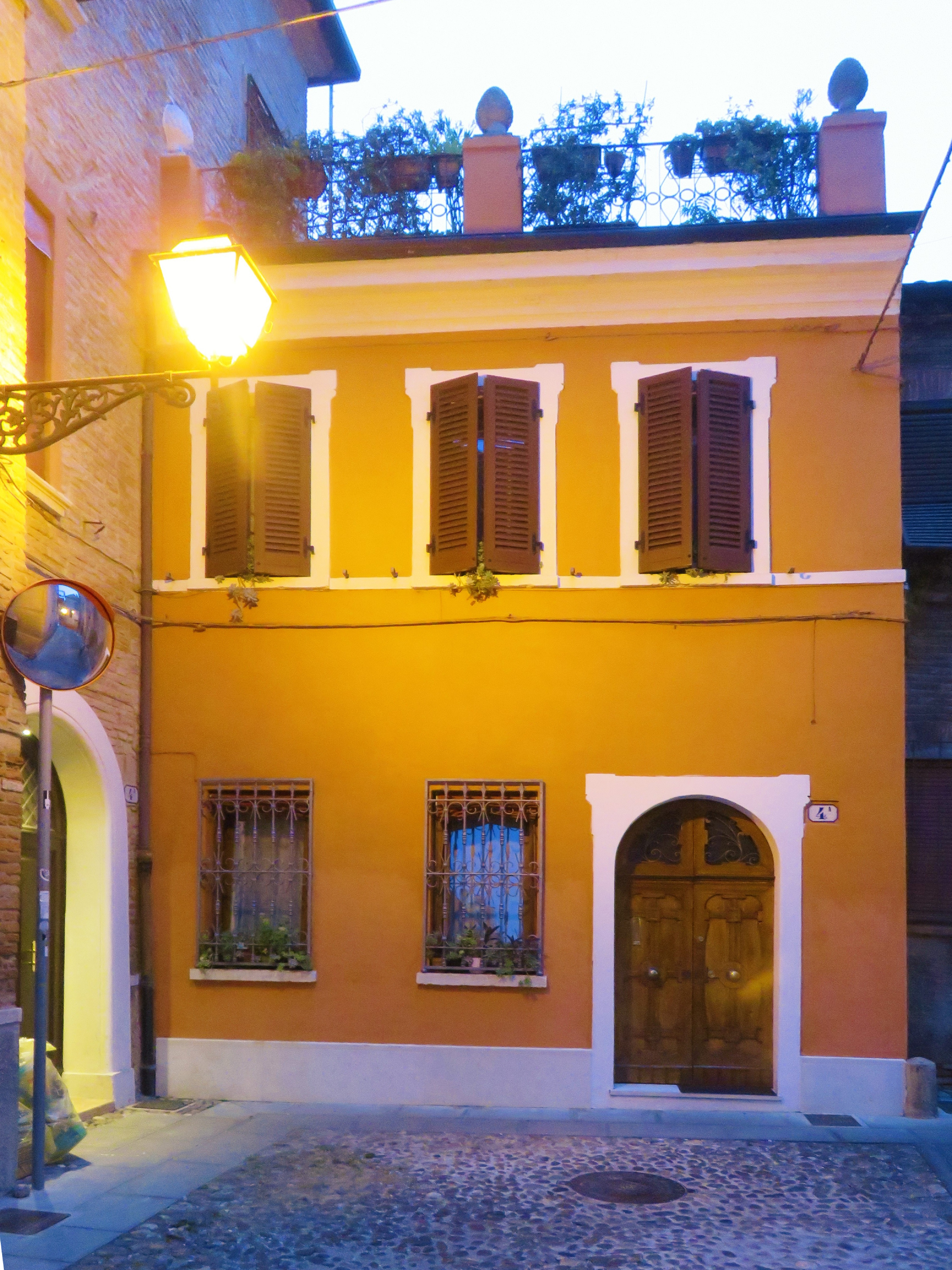 via del Carbone - Parte dove la strada forma un angolo di 90°